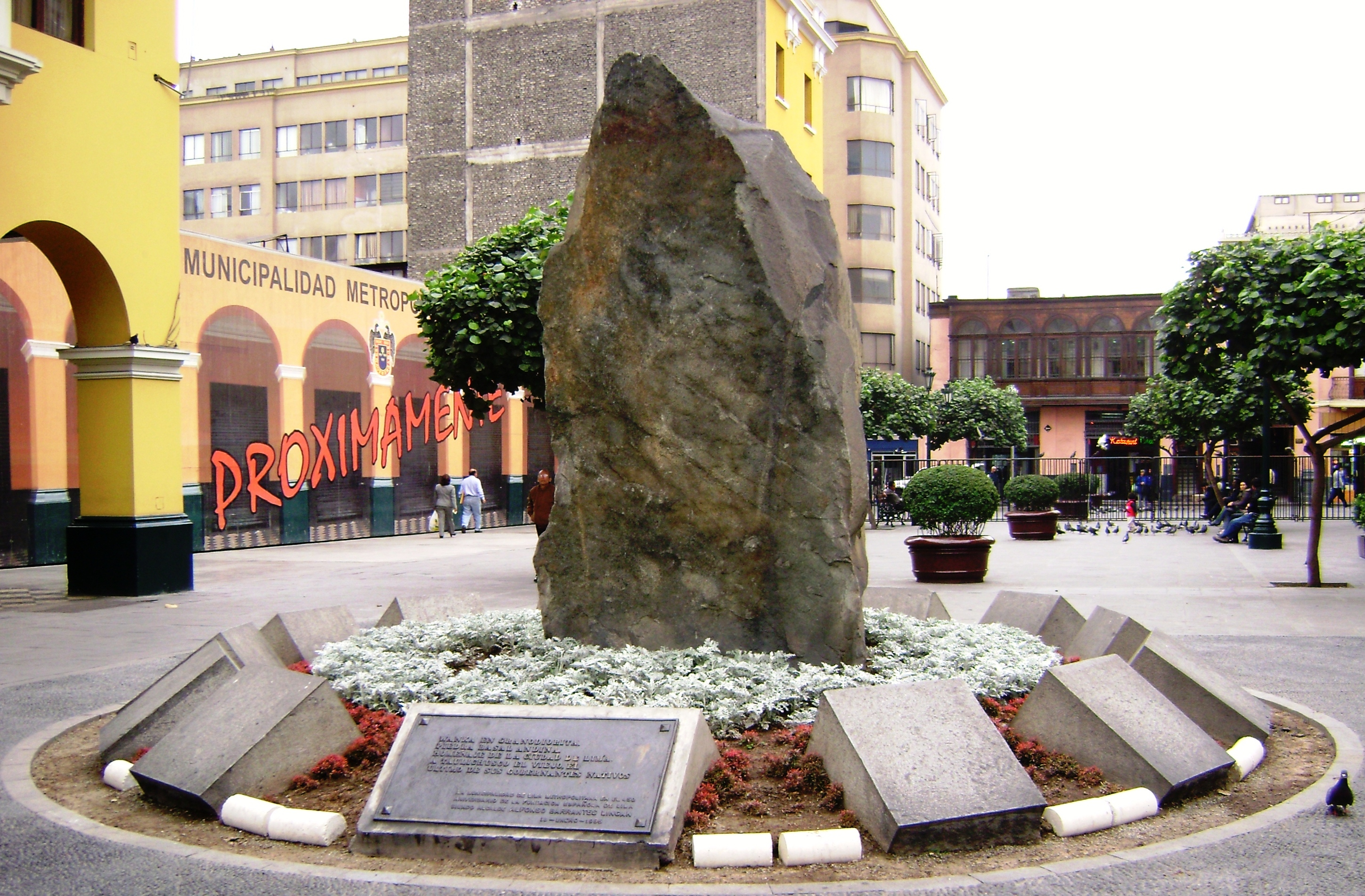 Piedra basal andina. Lima, Perú.